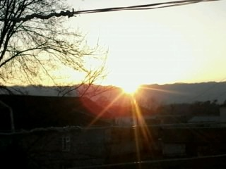 Türkoba